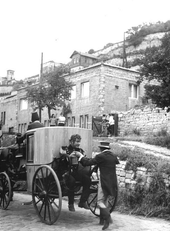 Zentralbild Kluge 12.8.1967 Bezirk Halle Freyburg: DEFA dreht "Hauptmann Florian von der Mühle" "Hauptmann von der Mühle" heißt ein neuer 70-mm-Farbfilm der DEFA, für den die Dreharbeiten begonnen haben. Zur Zeit hält sich der Drehstab mit Regisseur Werner W. Wallroth in Freiyburg auf und nutzt für Spielszenen die reizvolle Kulisse des Unstruttales. Neben Manfred Krug als Hauptdarsteller werden in diesem Film Rolf Herricht, Eberhard Cohrs, Fred Düren und Rolf Ludwig zu sehen sein. Hier eine Filmszene: Manfred Krug (Hauptmann) hilft Rolf Herricht (Amadeus) auf die Kutsche. Der Deutsche Fernsehfunk berichtet über die Dreharbeiten am 21.10.67 in einer Sendung unter dem Titel "Pause mit Musik".